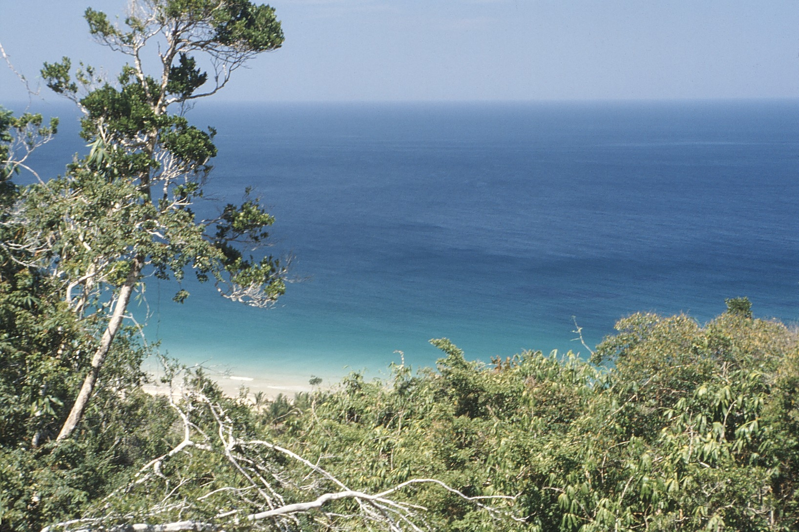 View to Sulu Sea